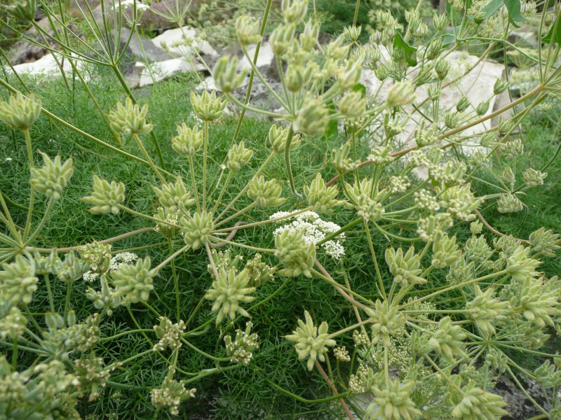 Athamanta cretensis, Botanischer Garten Erlangen, 2008